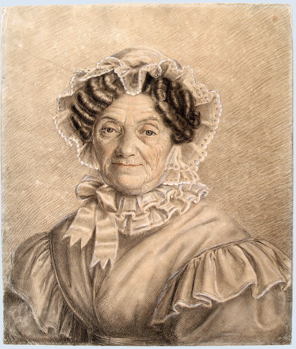 Louise von Lengefeld (1743-1823), Kreidezeichnung gehöht, von unbekanntem Urheber um 1820, Deutsches Literaturarchiv Marbach